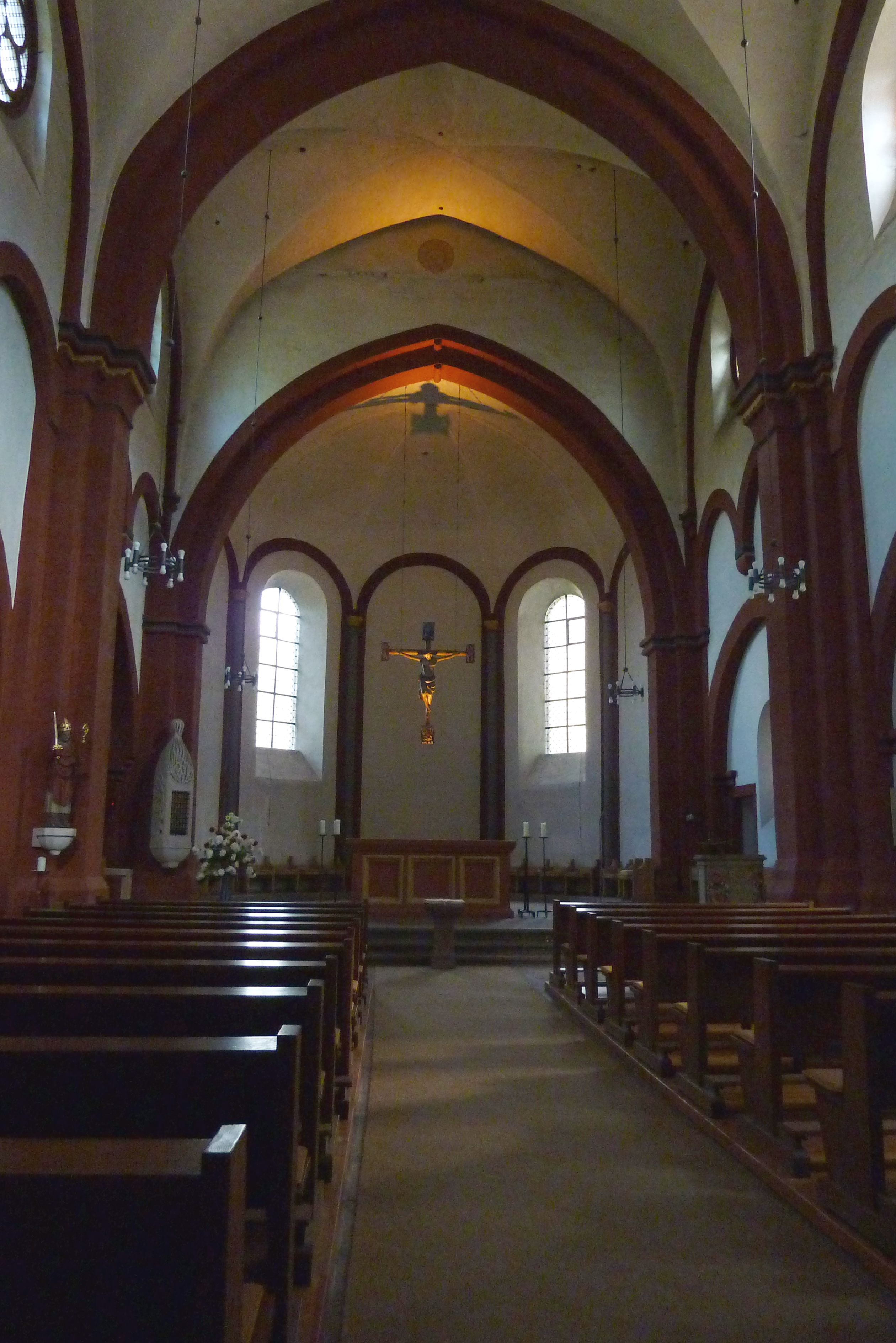 Ehemaliges Zisterzienserinnenkloster Sankt Thomas an der Kyll in Sankt Thomas im Eifelkreis Bitburg-Prüm (Rheinland-Pfalz), Innenraum mit Blick zum Chor